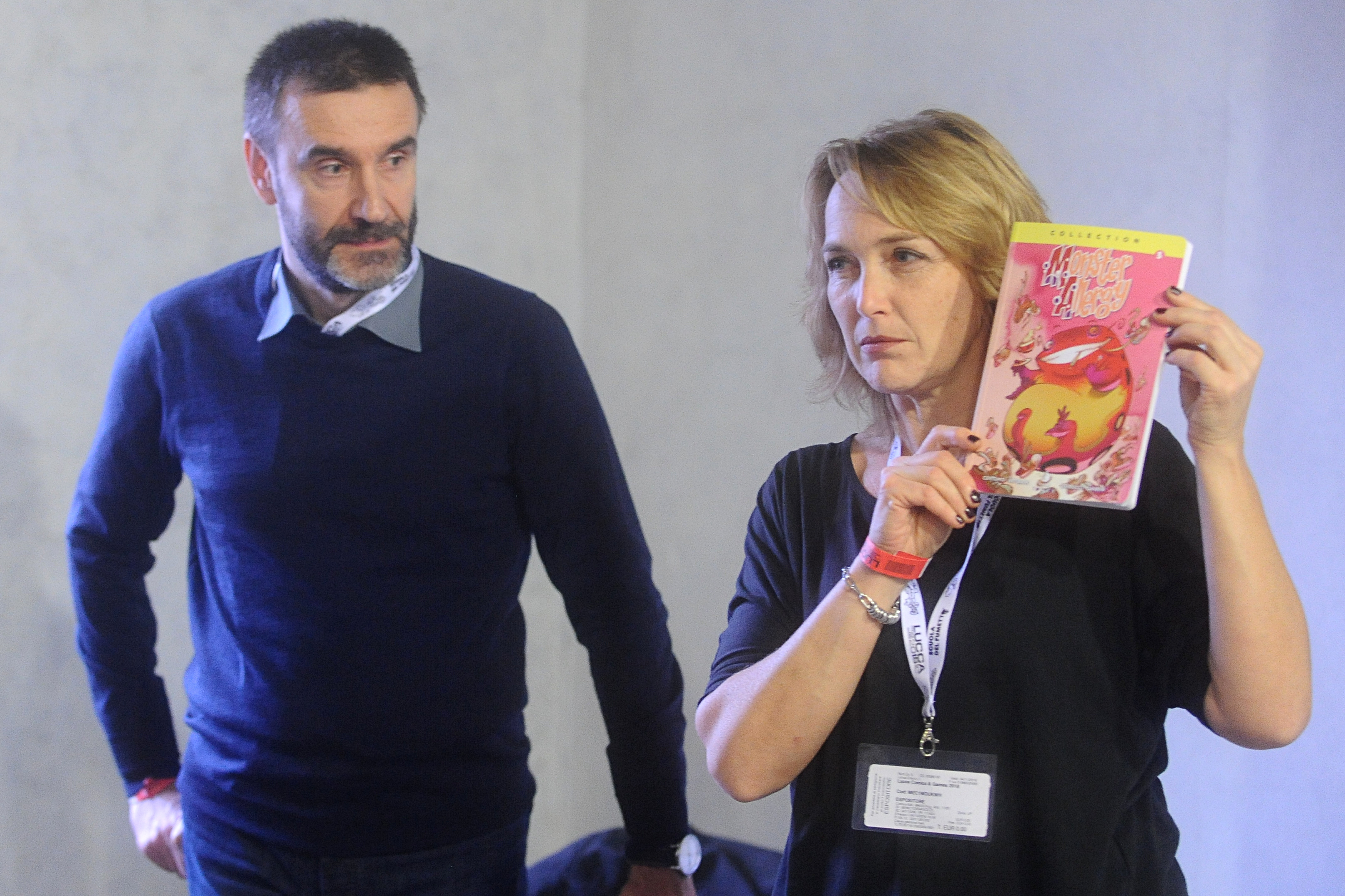 Francesco Artibani e Katja Centomo a Lucca Comics & Games. Family Palace (Real Collegio). Centomo tiene in mano un volume di Monster Allergy, serie creata assieme ad Artibani.